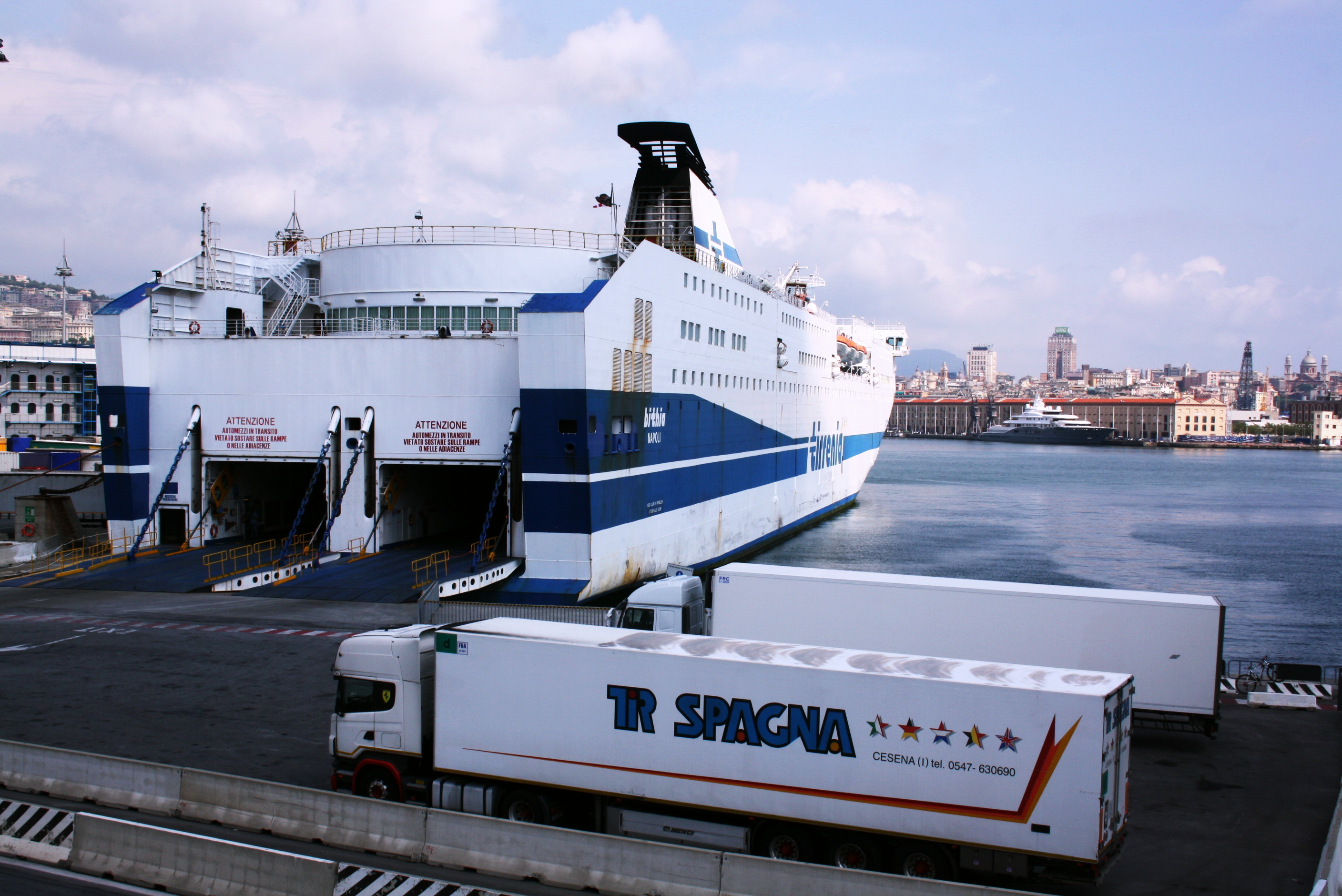 Autofähre im Fährhafen von Genua.